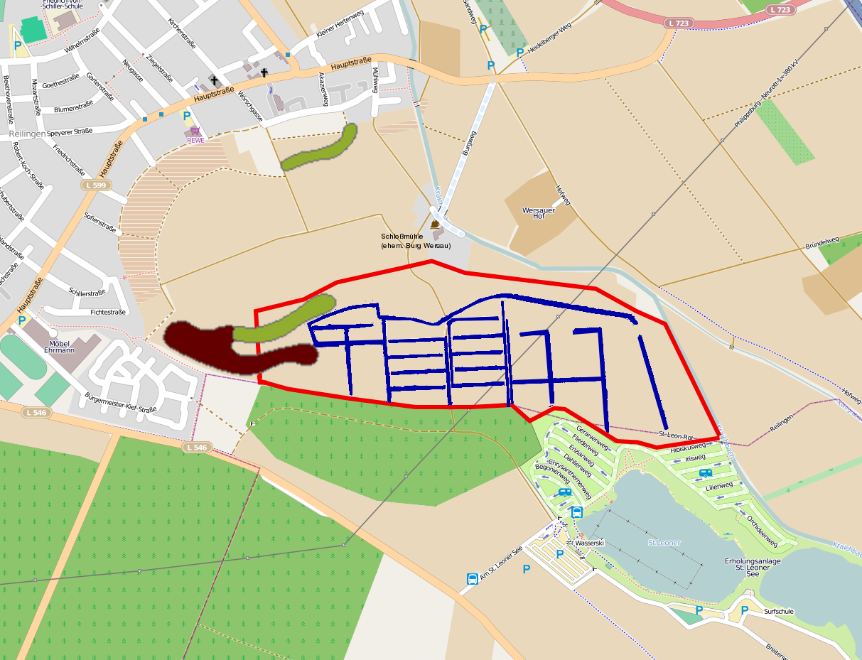 Lage der Kisselwiesen bei Reilingen(rot umrandet) mit Entwässerungskanälen (blau). Das Niedermoor Fröschau ist braun (Anmoor) und grün (Niedermoor) markiert This map may be incomplete, and may contain errors. Don't rely solely on it for navigation.